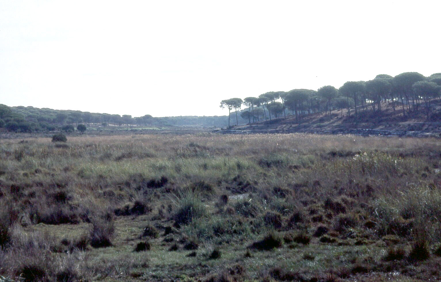 Lagunas de Palos y Las Madres This is a photography of a Site of Community Importance in Spain with the ID: ES6150004. Natura2000 entry, EEA entry